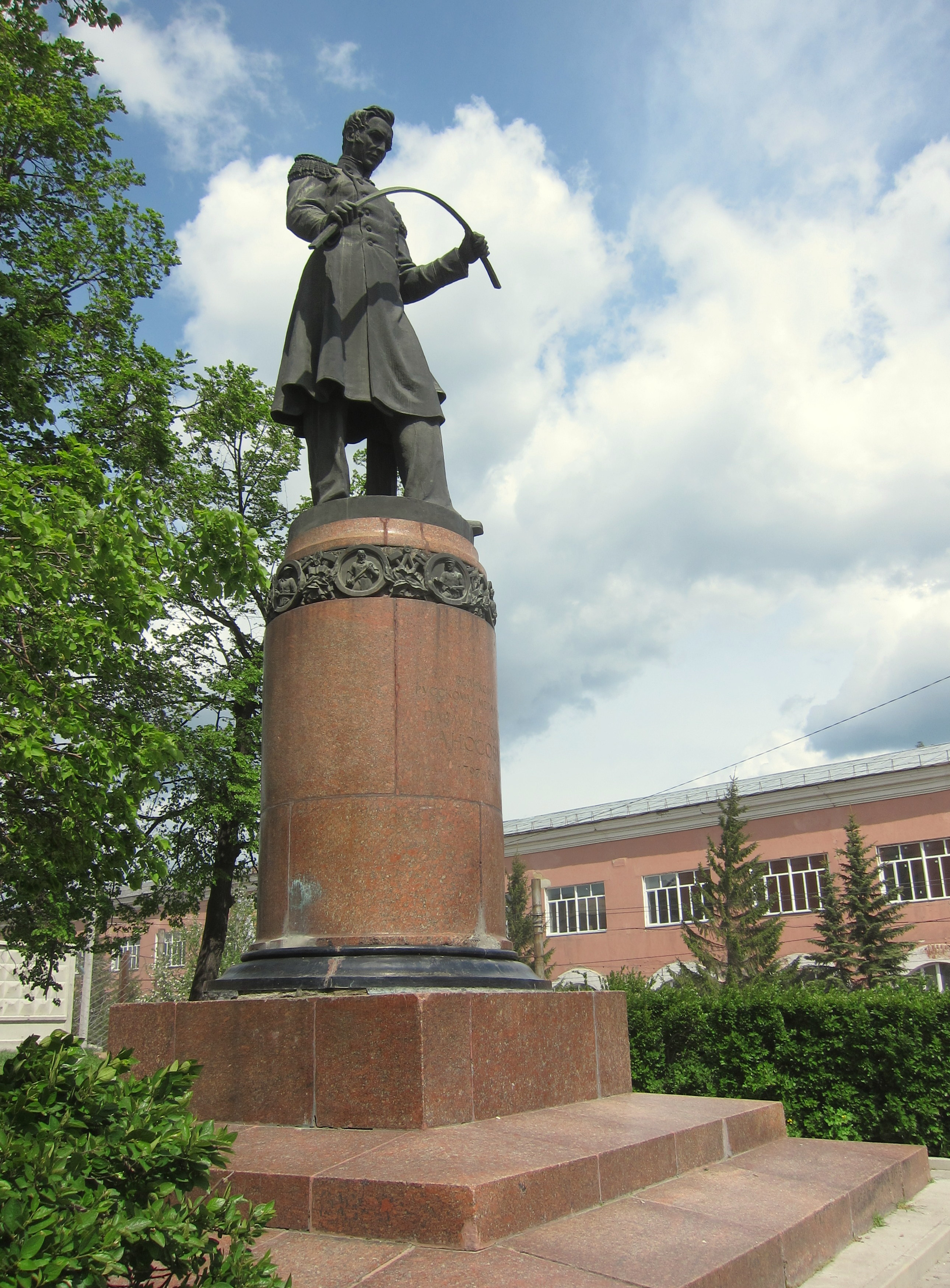 памятник металлургу Аносову П.П. (Челябинская область, Златоуст, площадь III Интернационала)